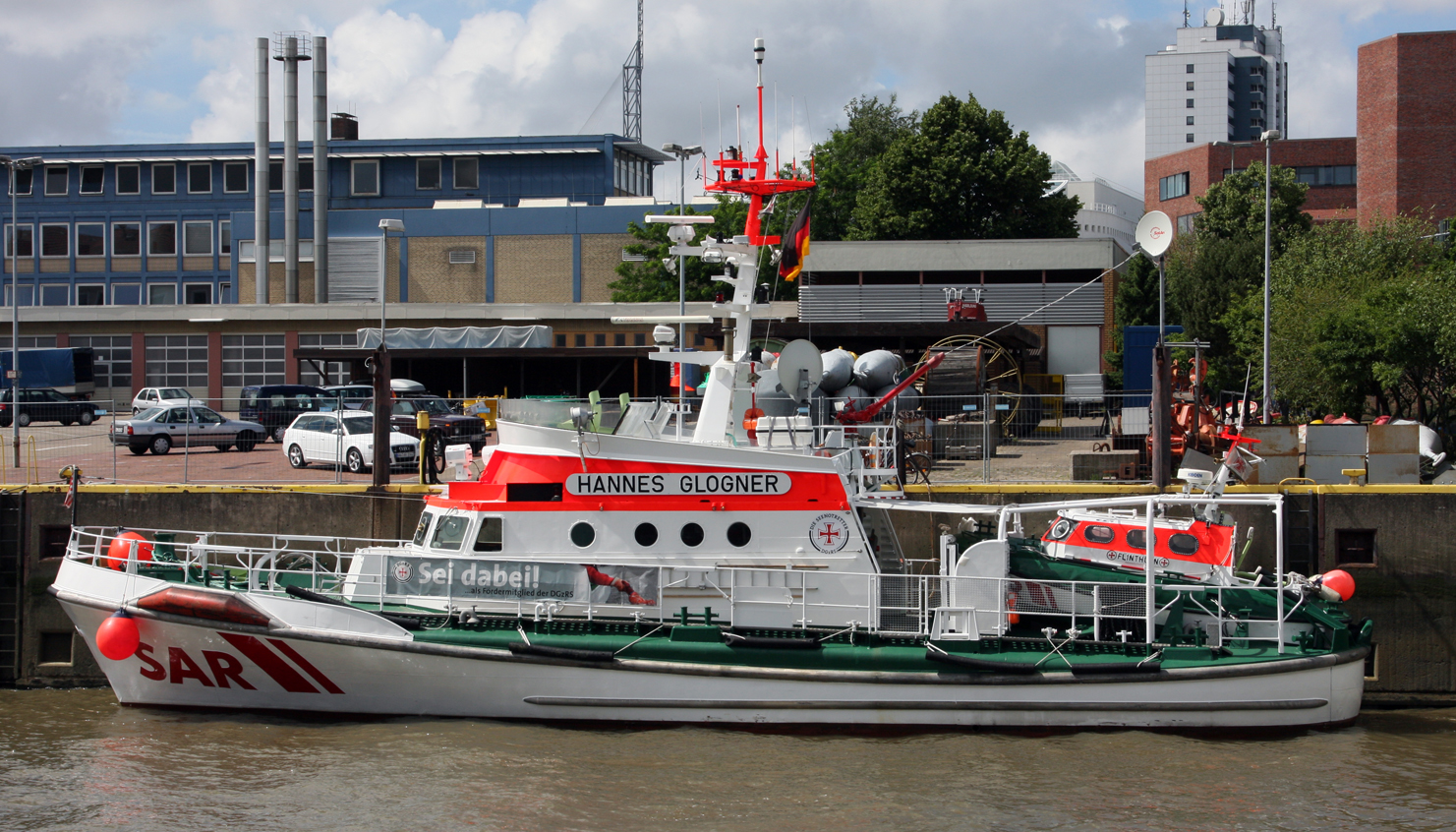 SK Hannes Glogner im Juni 2008 als Vertretung in Bremerhaven